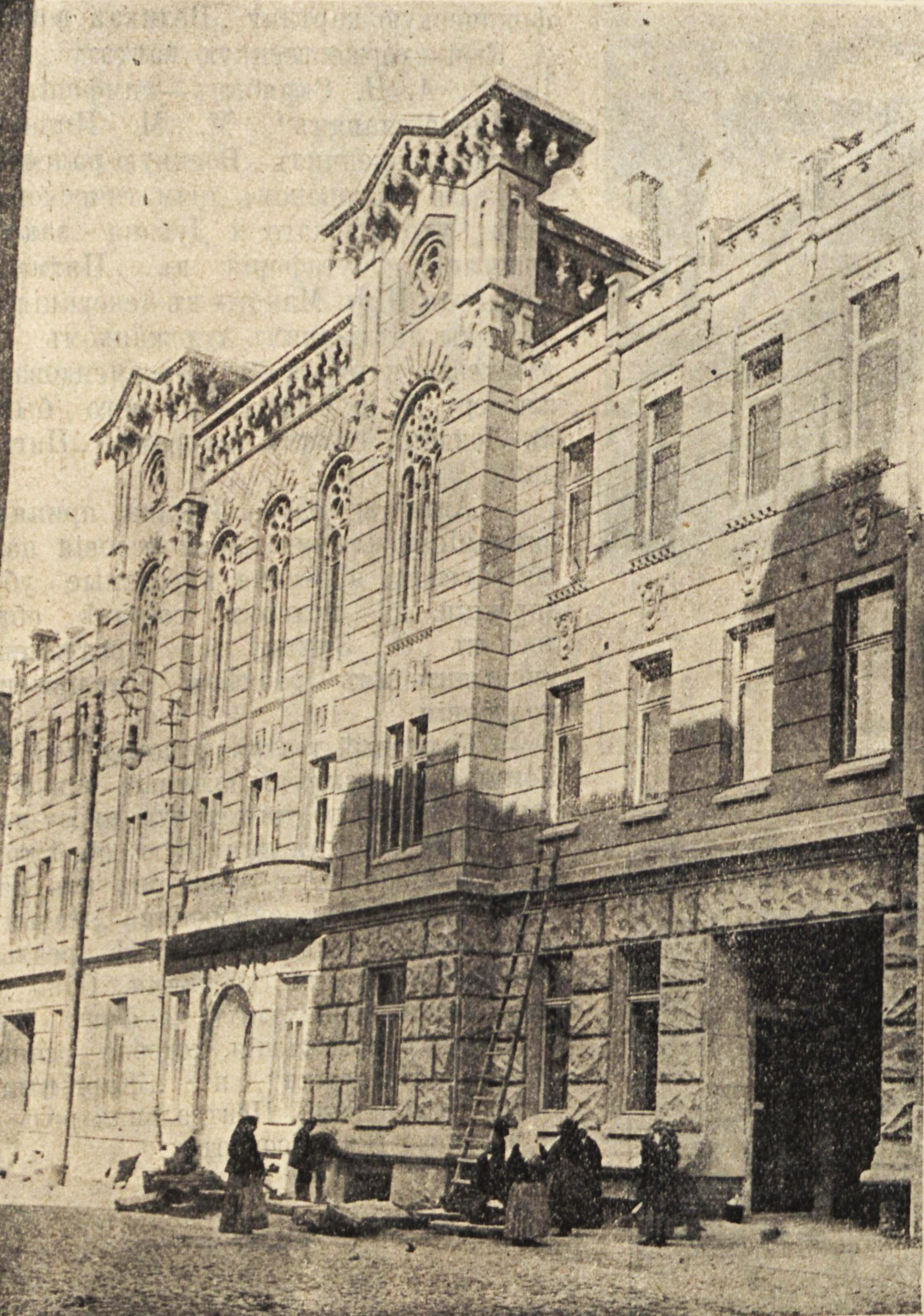 Садиба товариства швидкої медичної допомоги, Київ, вул. Рейтарська, 22